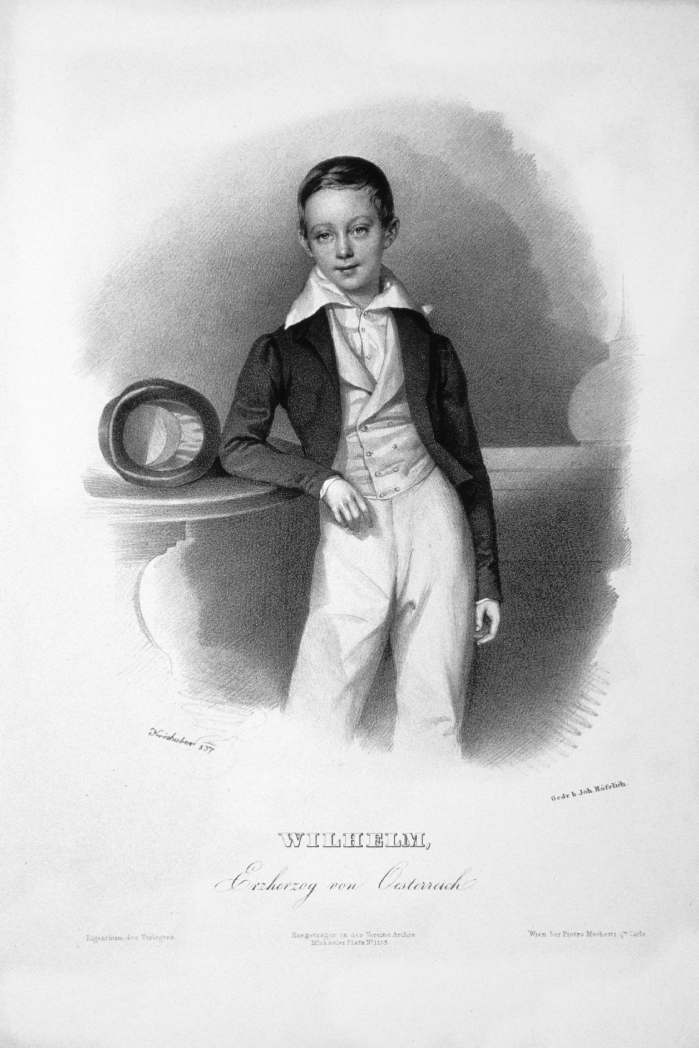 Wilhelm Karl Franz von Habsburg-Lothringen (1827-1894), jüngster Sohn des Feldmarschalls Erzherzog Karl. k. k. Feldzeugmeister, Artillerieinspektor. Lithographie von Josef Kriehuber, 1837